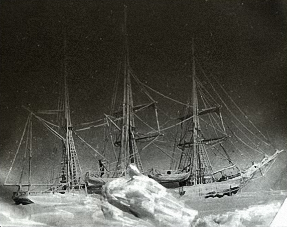 1899: Die Belgica im Packeis. Das Foto wurde während der beginnenden Polarnacht aufgenommen Belgica-Expedition).